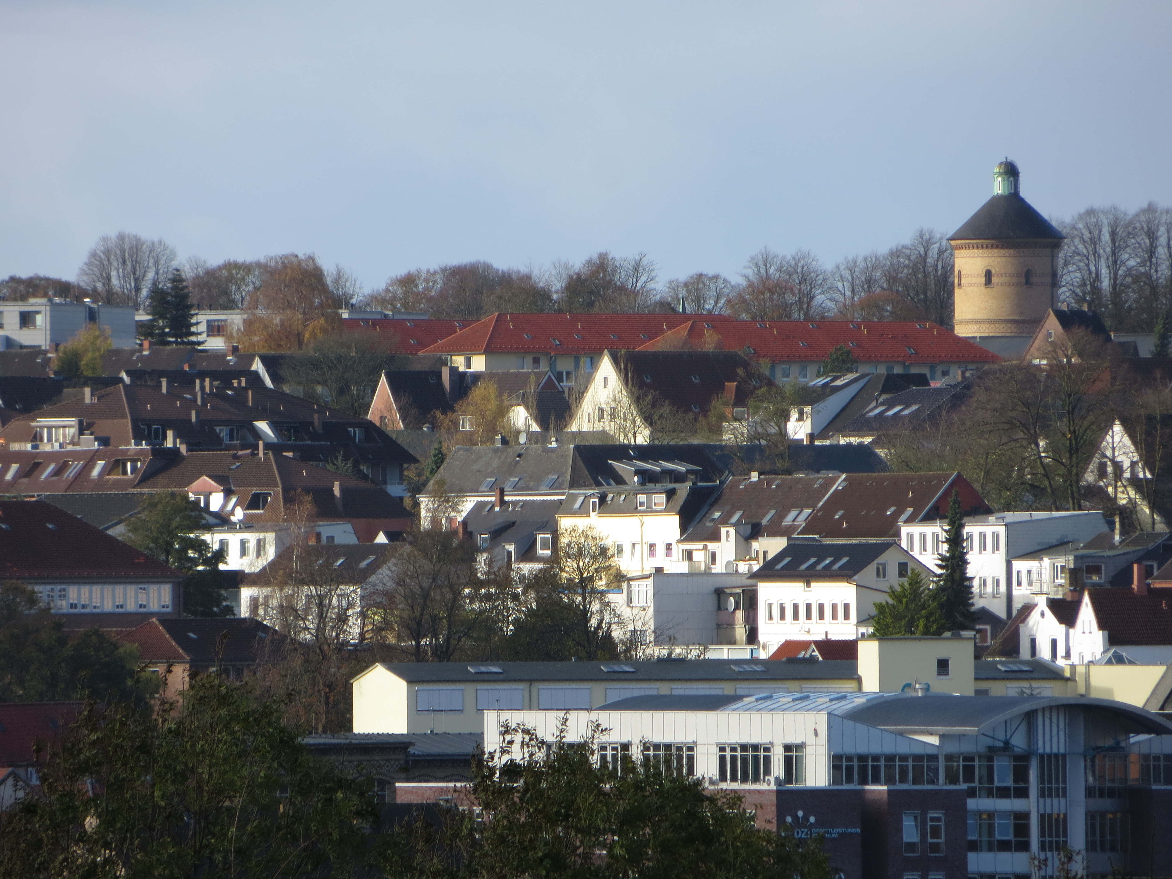 Alter Wasserturm vom Sandberg aus (Flensburg 2013), Bild 01